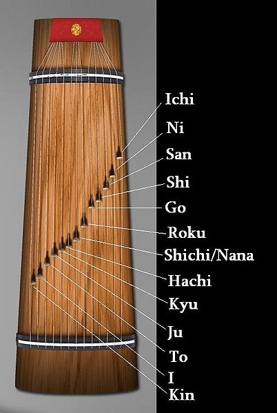 Representación de la escala musical japonesa Ryo en el koto.